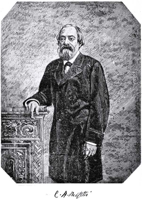 C. A. Rosetti